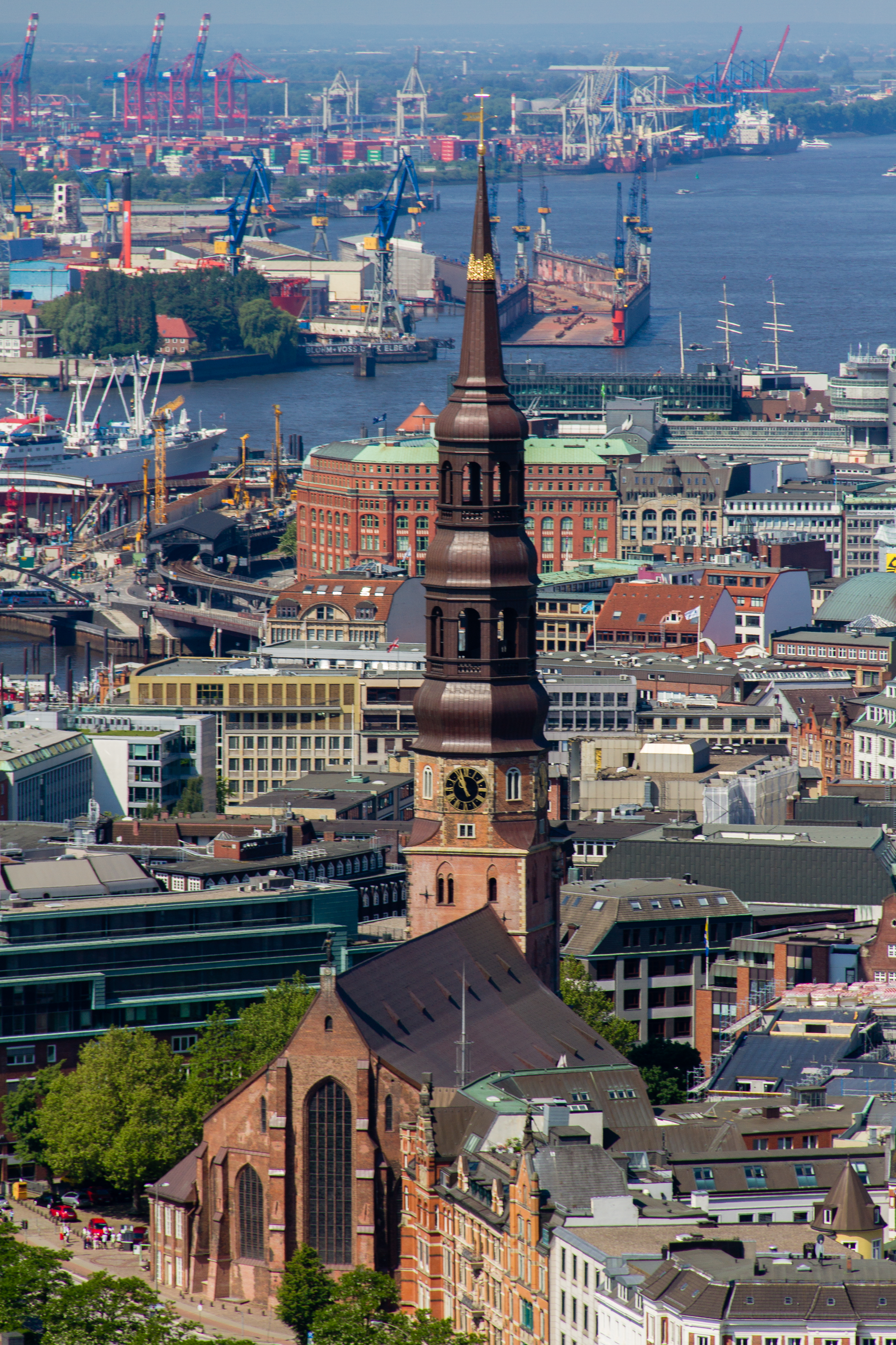 Aufnahme während des Projekts Heißluftballon